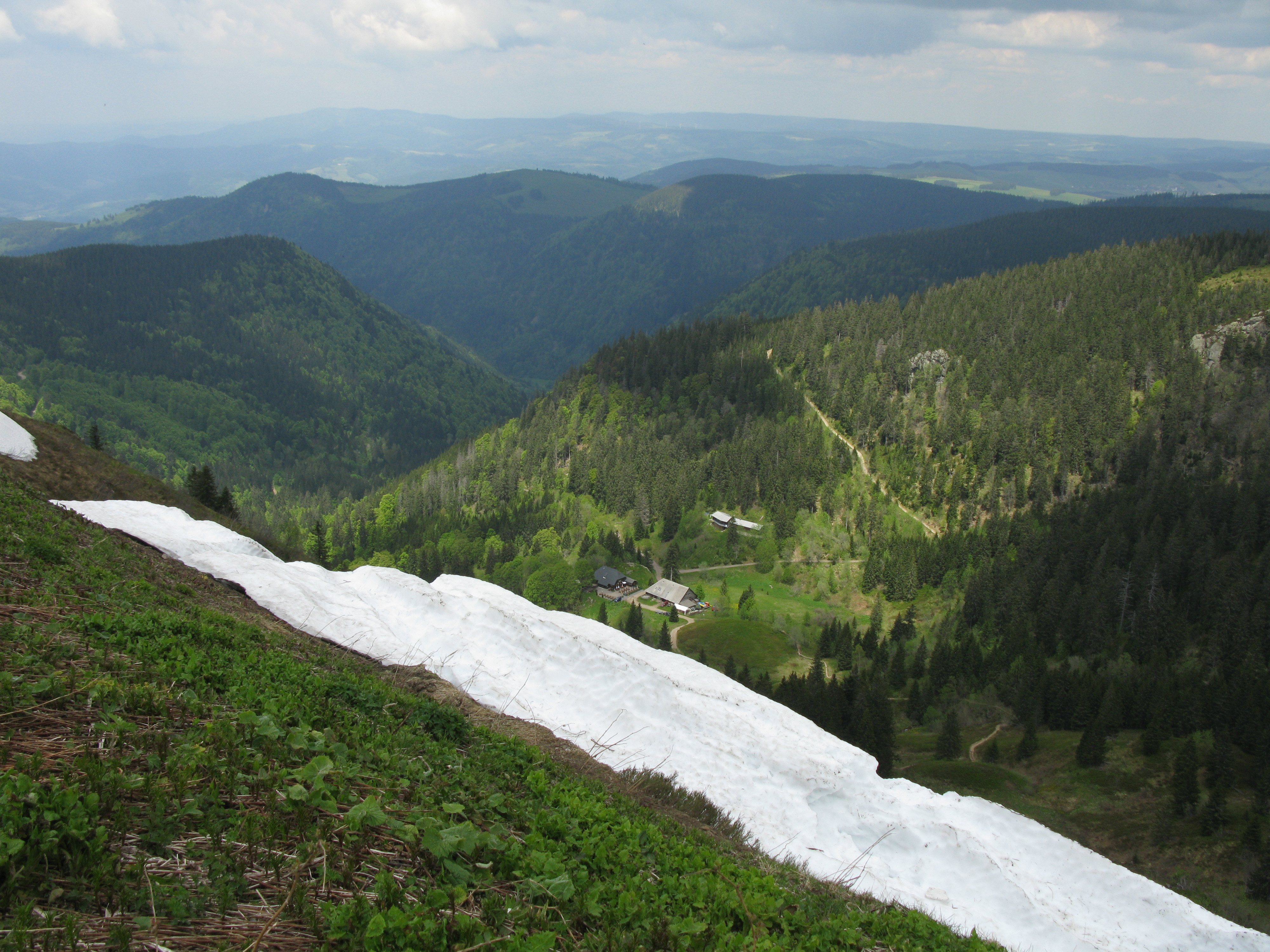 Blick vom Feldberg ins Zastler Loch mit Zastler Hütte, am Horizont der Kandel